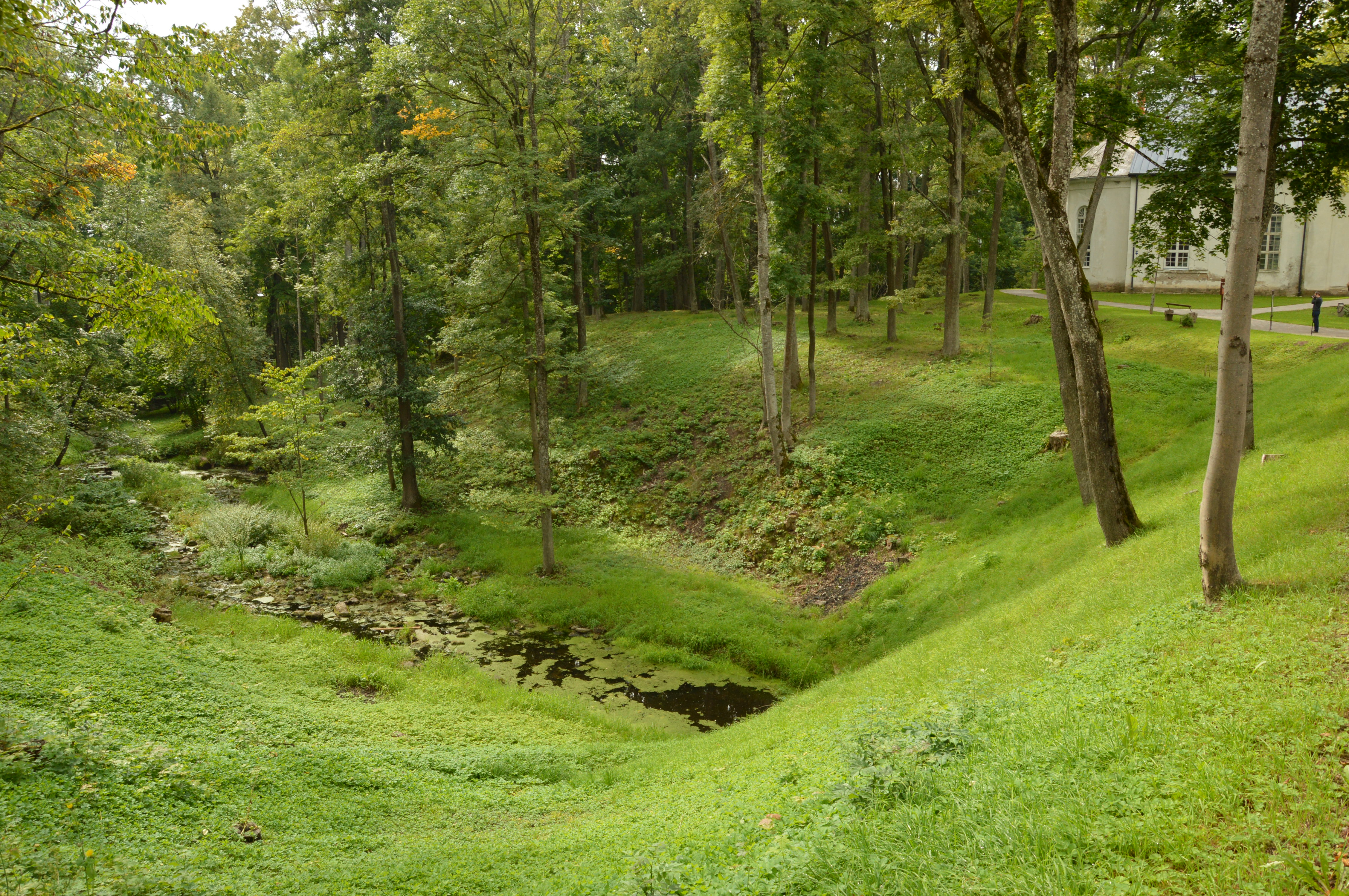 Gulbene (Kulna) linnamäge ümbritsev kraav